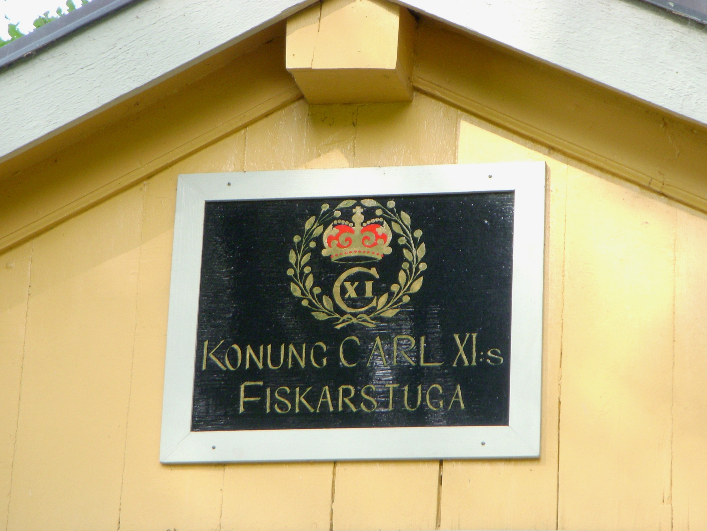 Karl XI:s fiskarstuga, skylt